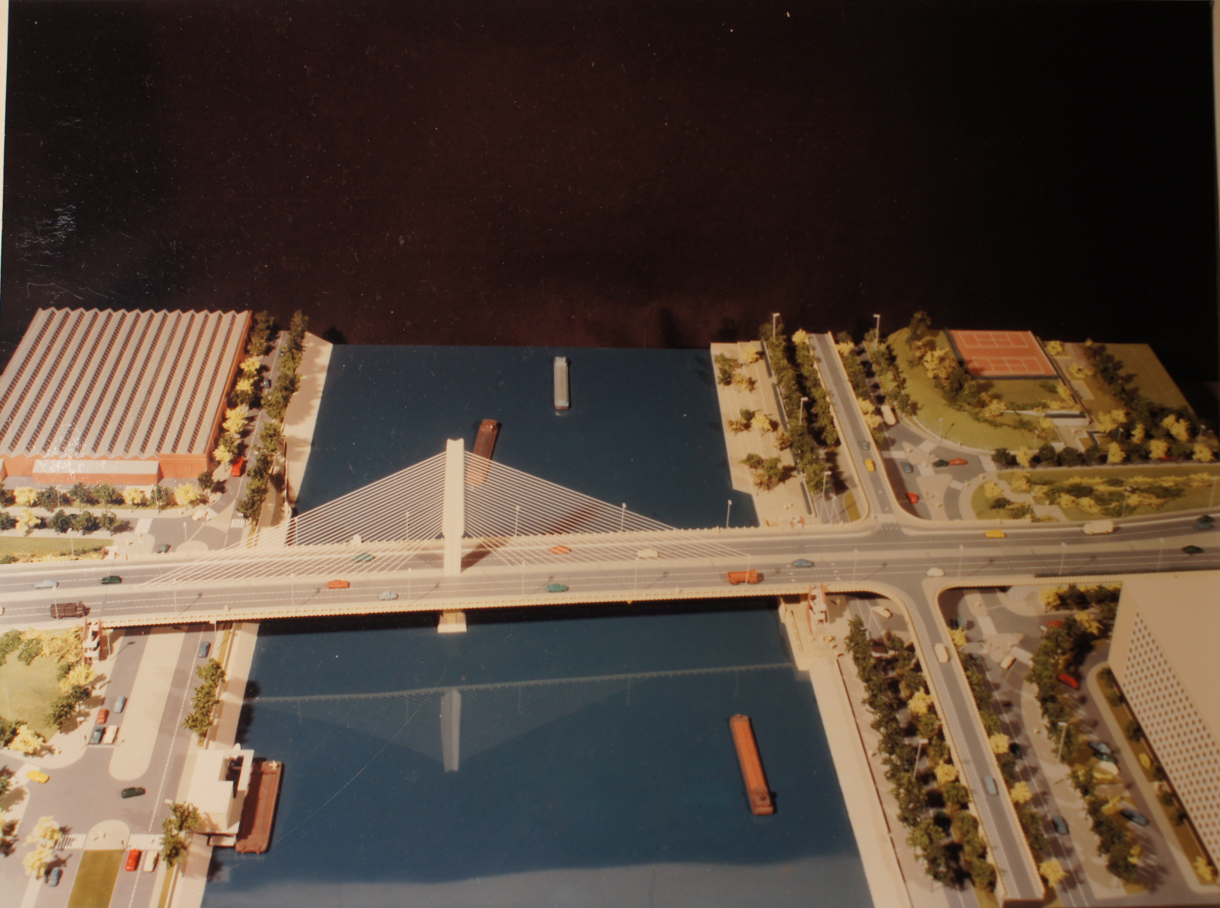 Photos maquette